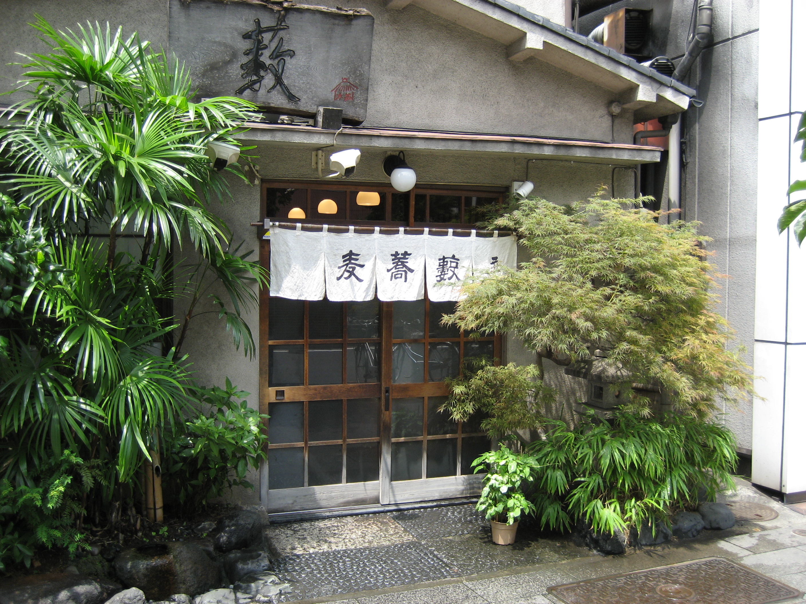 L'entree d'un restaurant dans le quartier de Asakusa The entrance of old established soba restaurant Namiki Yabu-soba